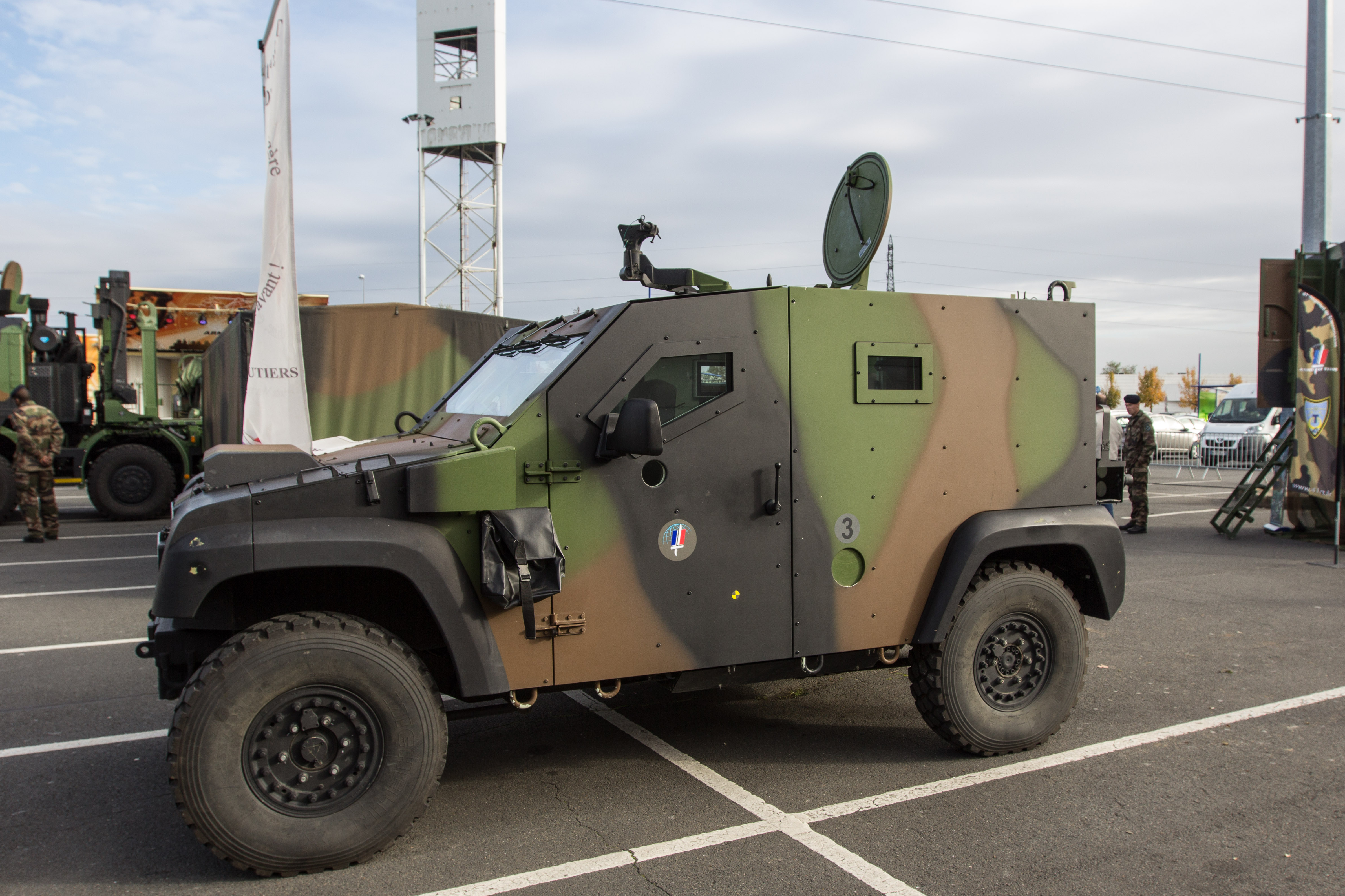 Matériel présenté lors de l'exposition "Les forces armées s'invitent à villabé", du 23 au 25 octobre 2014 au Centre commercial Villabé A6 / Villabé / Essonne / France